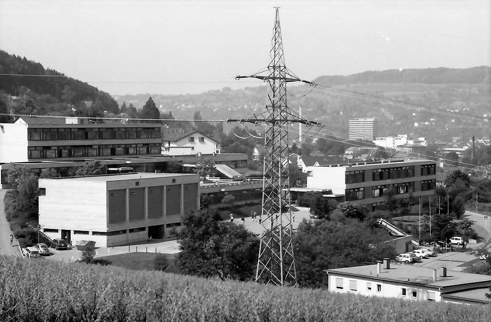 Lörrach: Pädagogische Hochschule, Gesamthaus von Osten